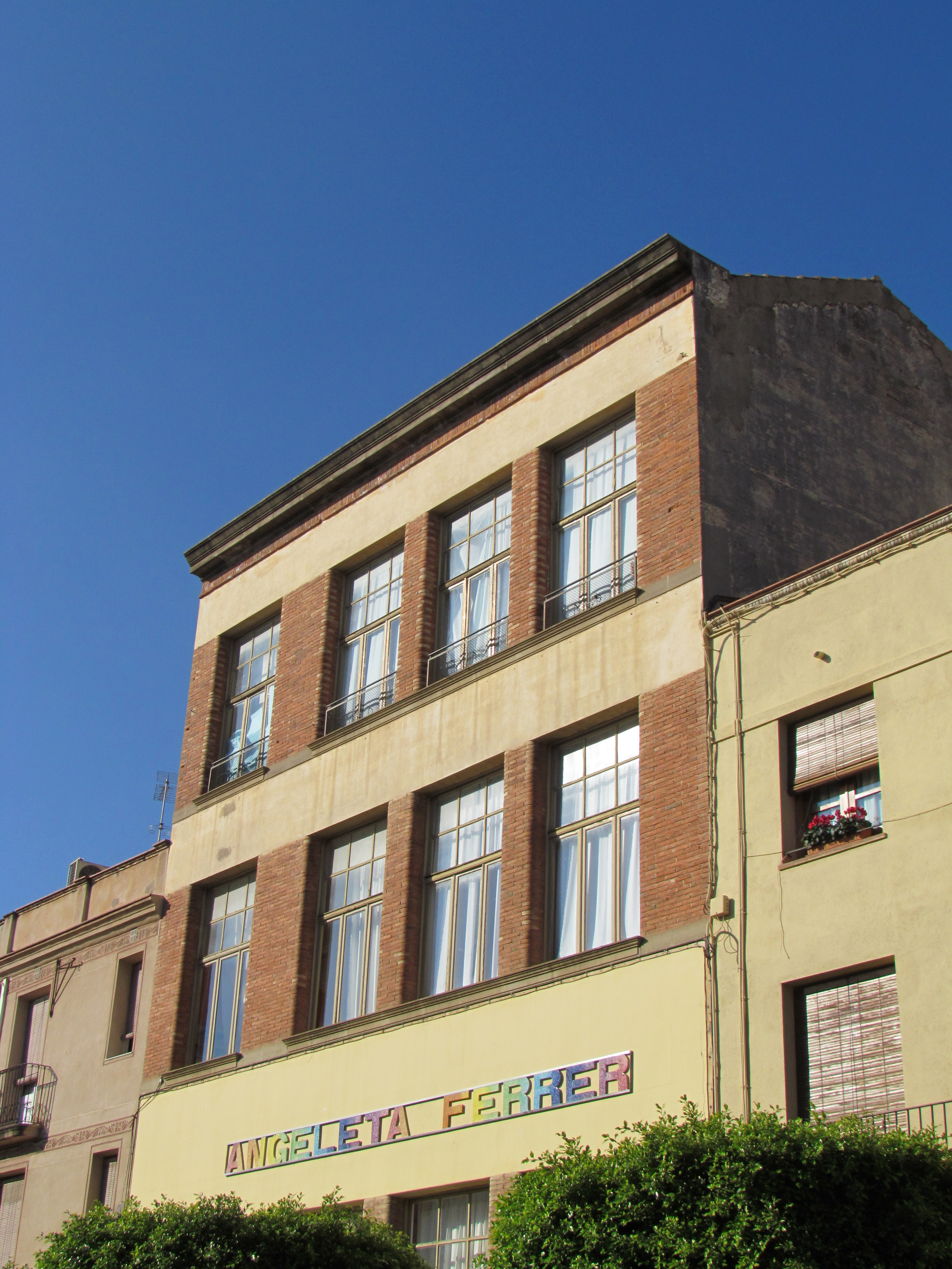 Vista de la Façana de l'Escola El Pilar. (Mataró, el Maresme)